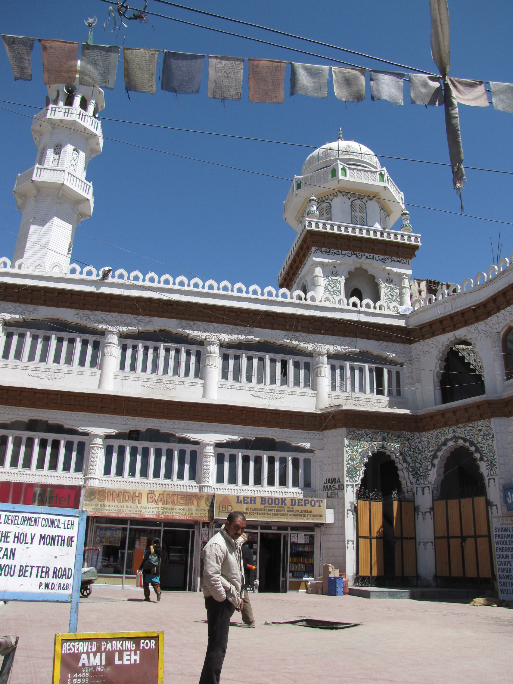 Leh Old Leh